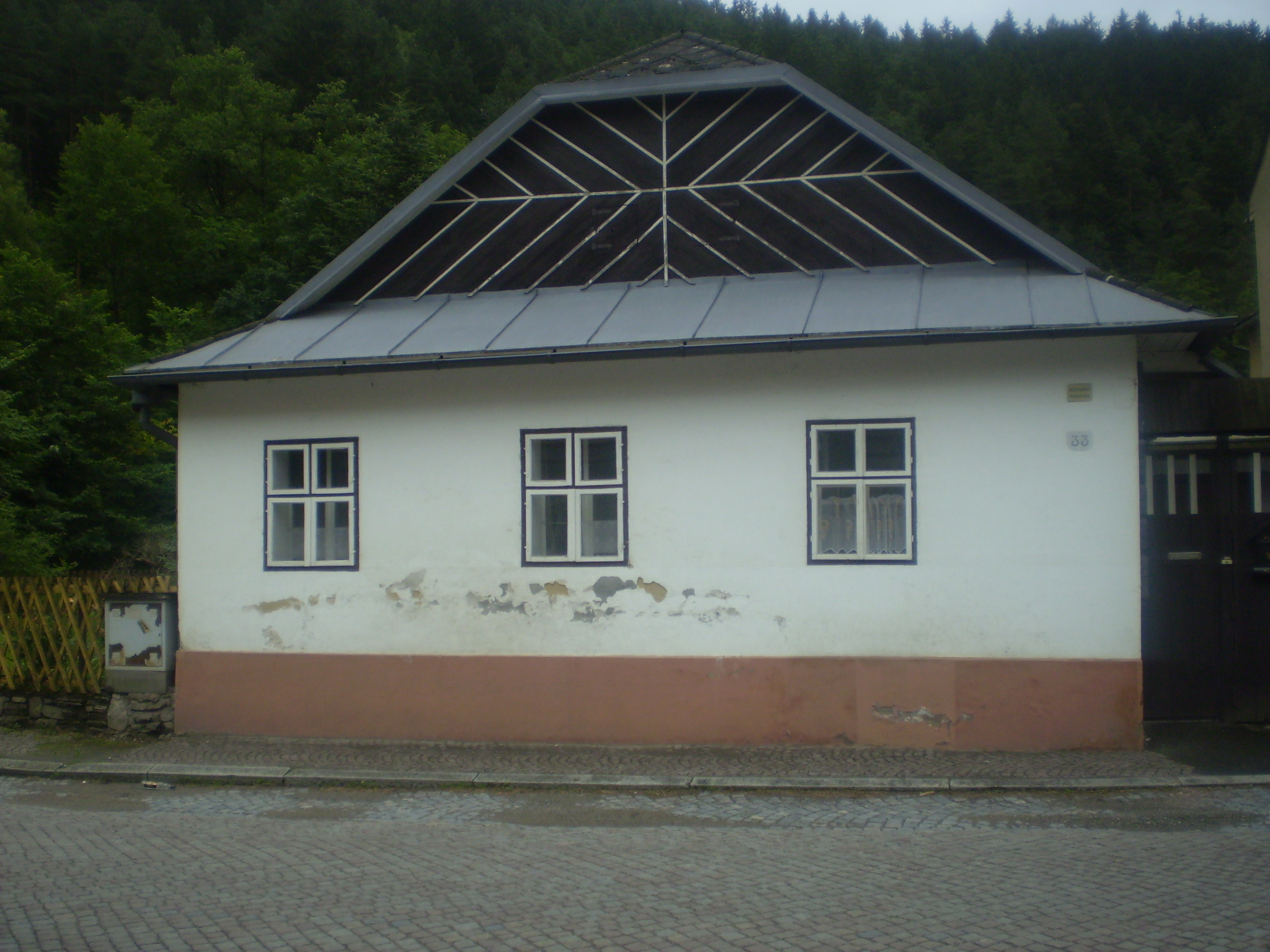 jeden z nejstarších domů v Jimramově